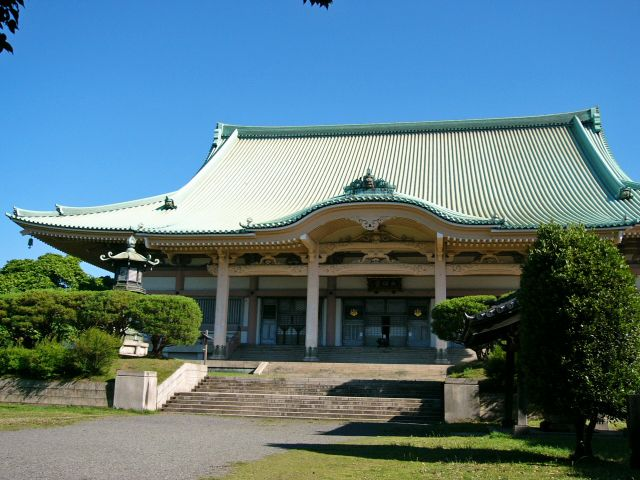 総持寺、大祖堂（だいそどう）